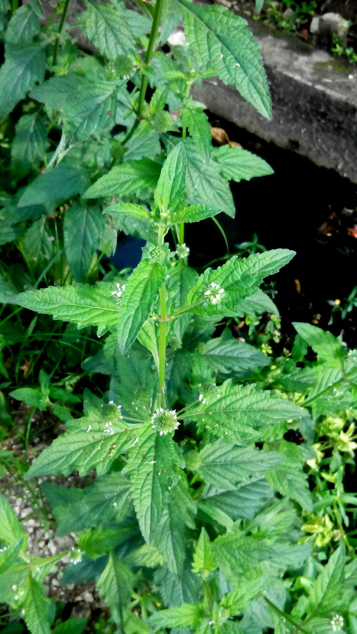 မြန်မာဘာသာ: အပင်